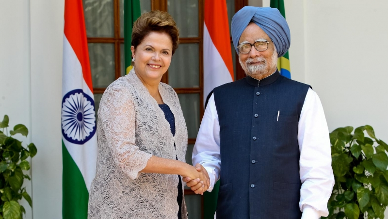 Presidenta Dilma Rousseff durante cerimônia oficial de chegada no Palácio Presidencial.